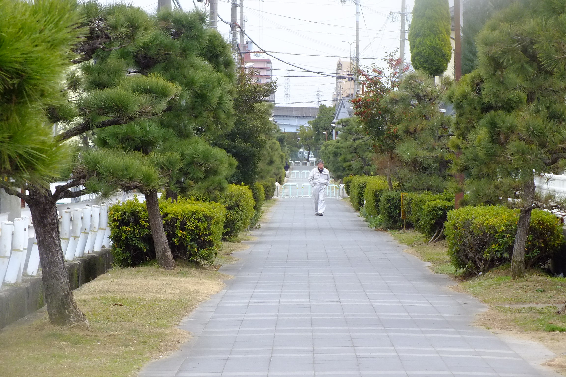 別府鉄道 廃線跡 円長寺